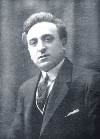 L'attore e regista regista Roberto Roberti (Vincenzo Leone) (1879-1959).